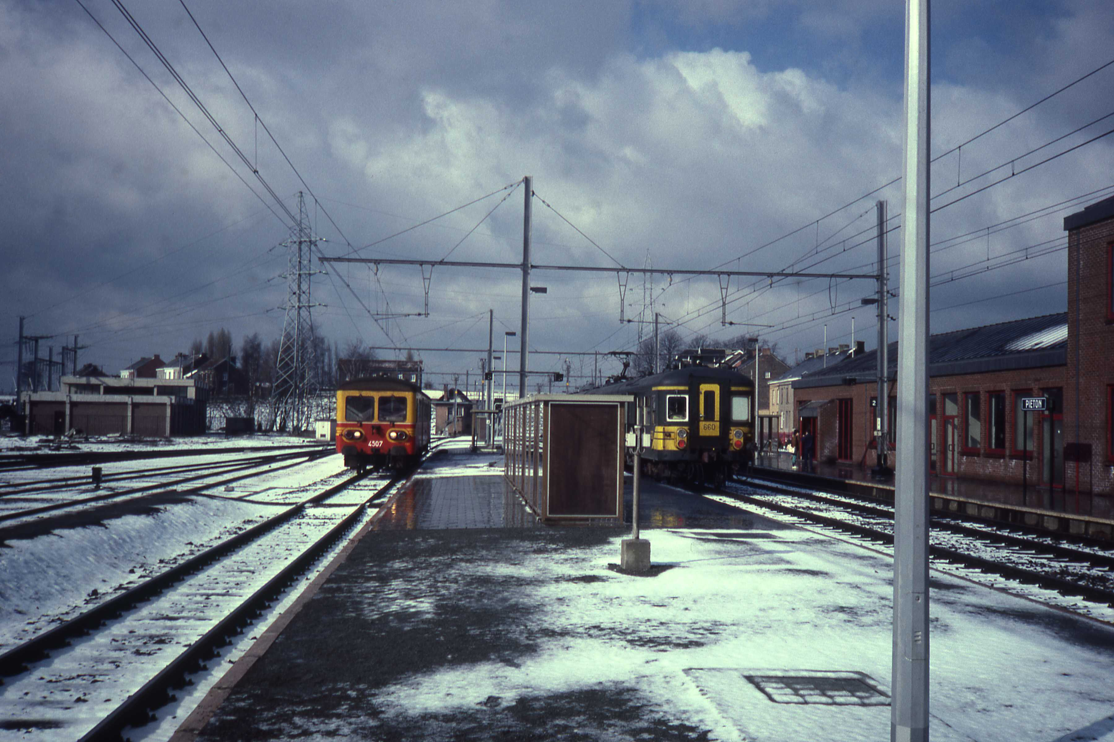 Aansluiting in station Pieton op de autorail naar Roux op spoorlijn 121, nu opgeheven.